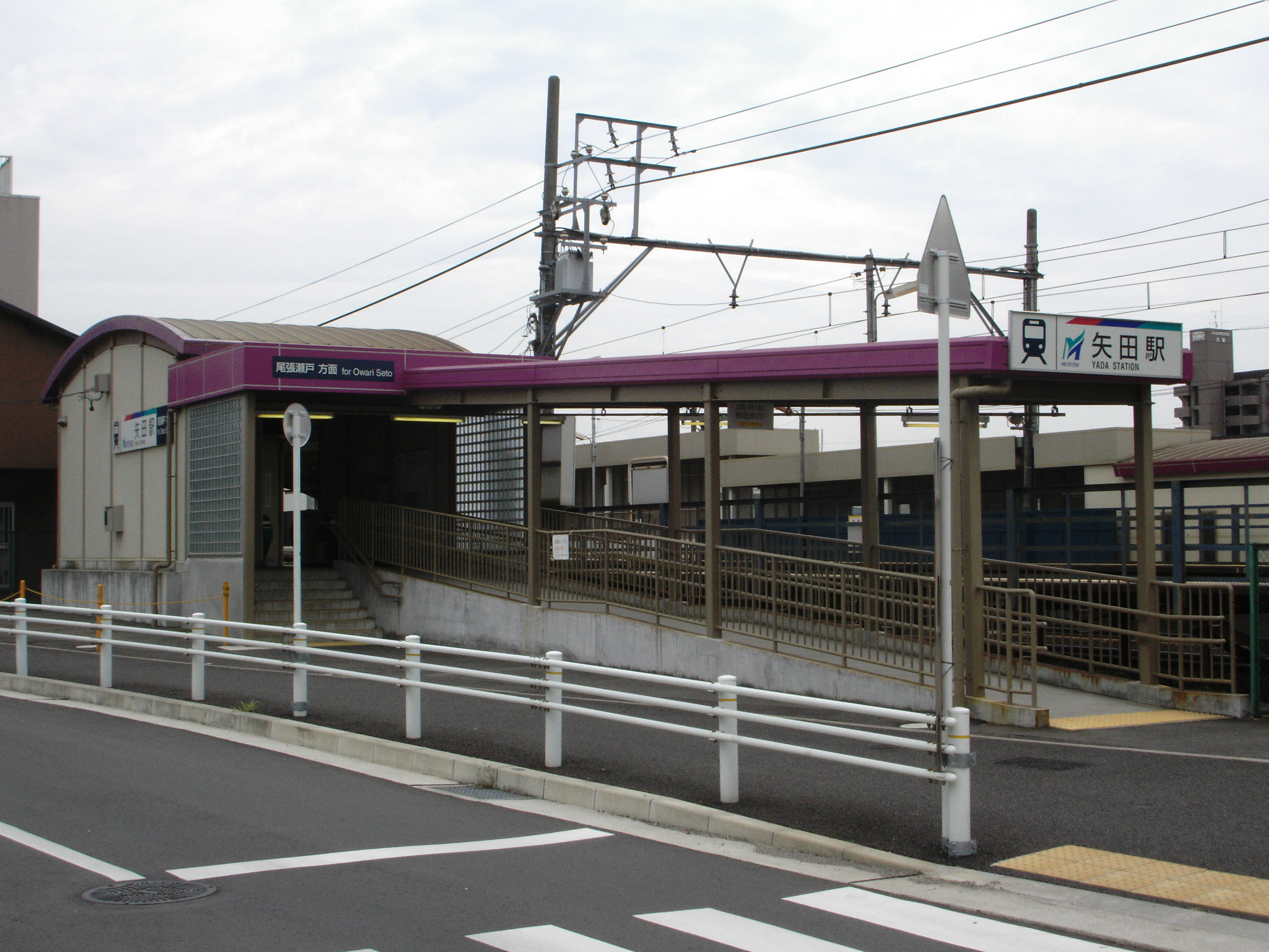 矢田駅